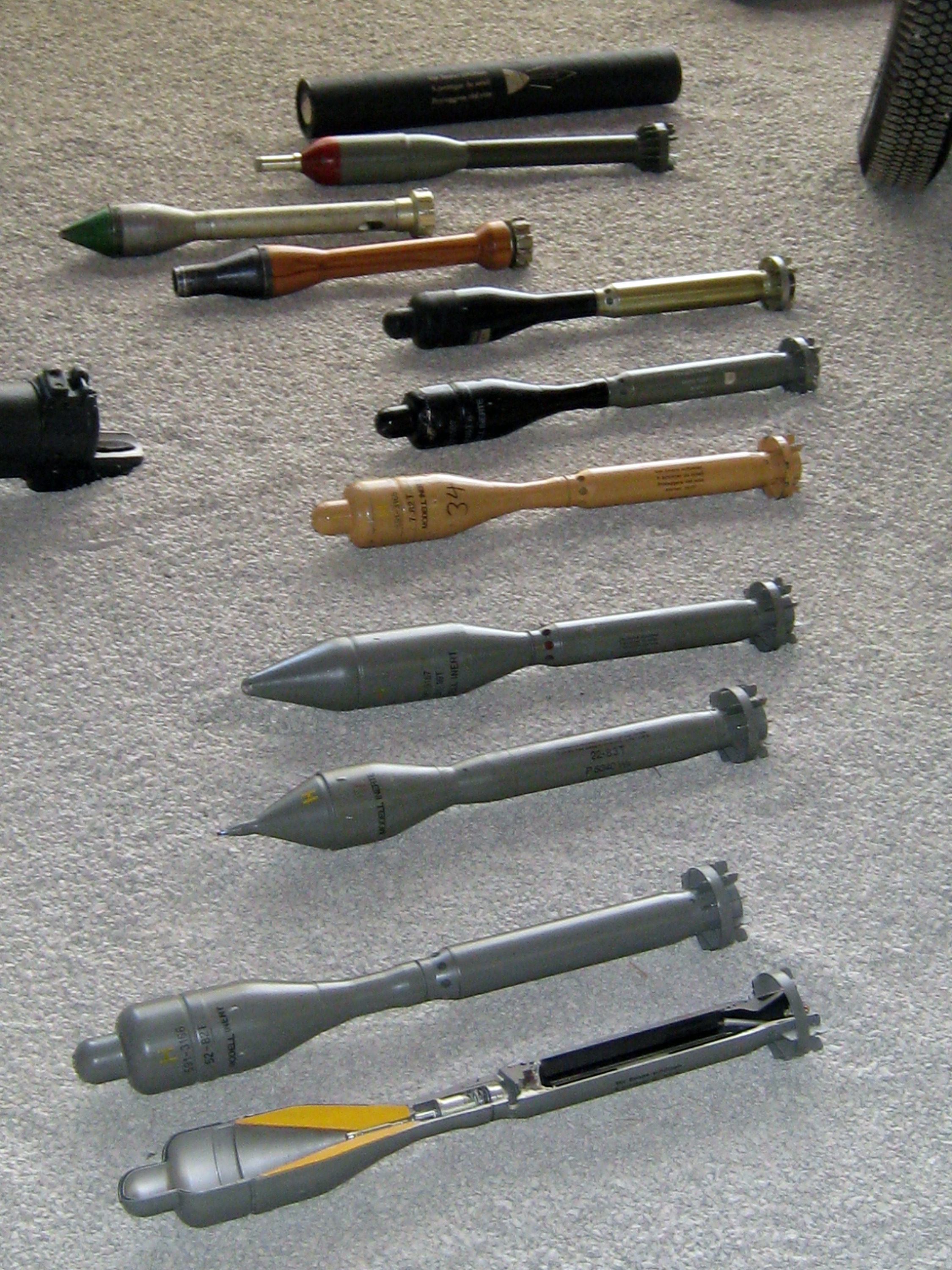 Munition für Raketenrohr im Militärmuseum Full